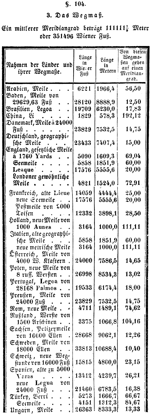 Alte Maßeinheiten / Alte Maßeinheiten / Wegmaße